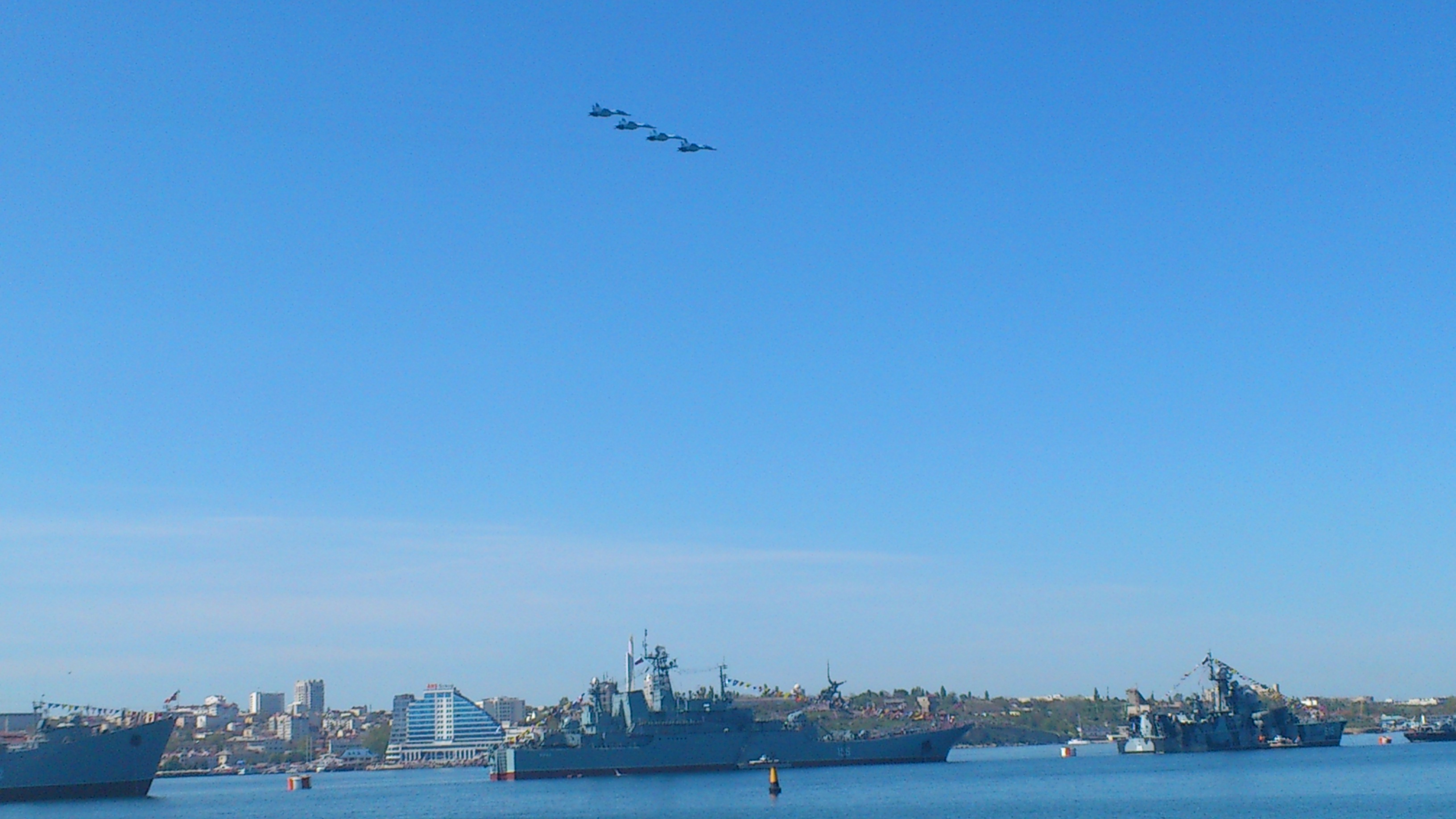 Военно-морской парад в Севастополе в честь 70-летия Победы в Великой Отечественной войне